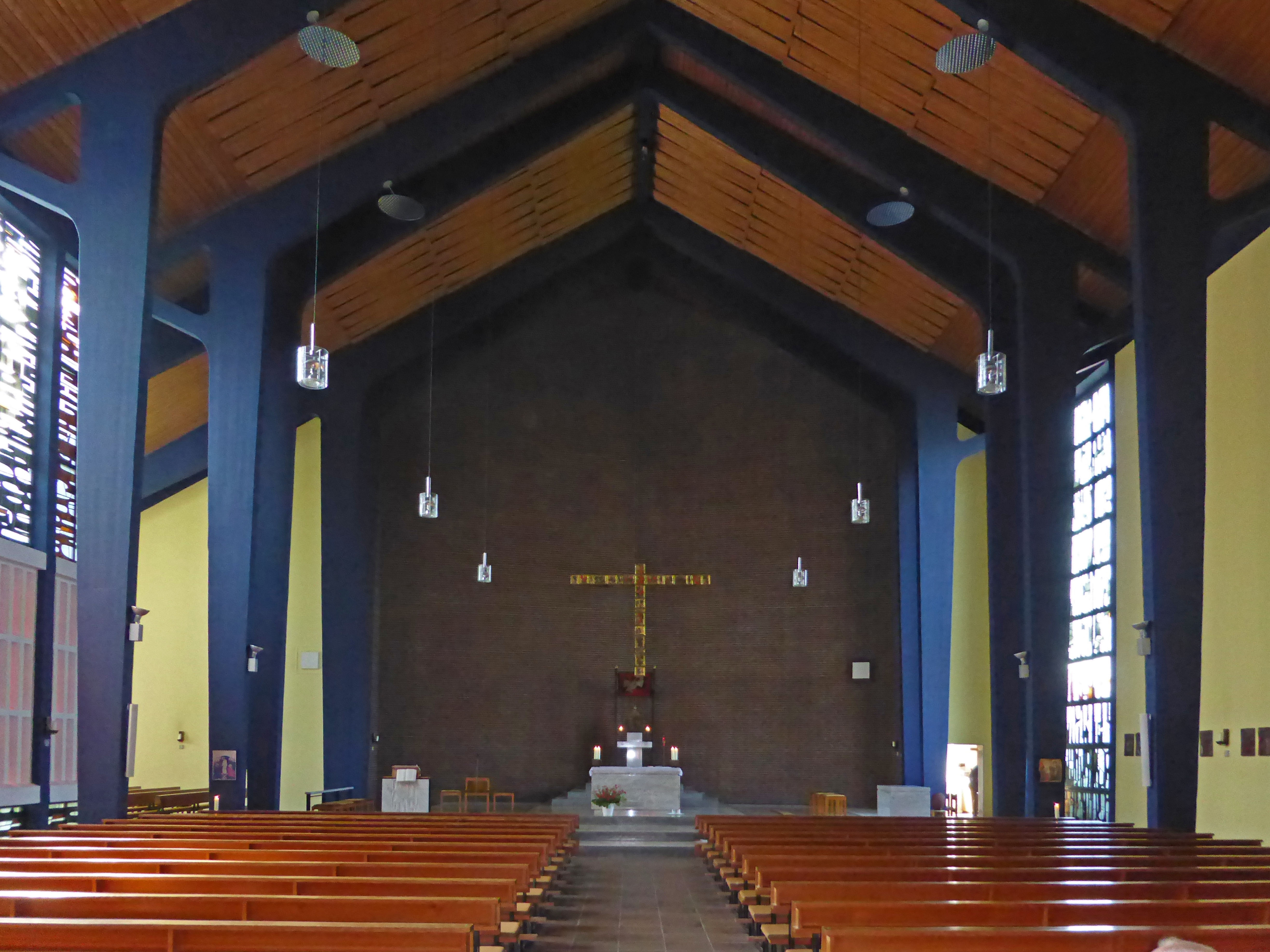 Katholische St.-Benno-Kirche in Goslar-Jürgenohl.